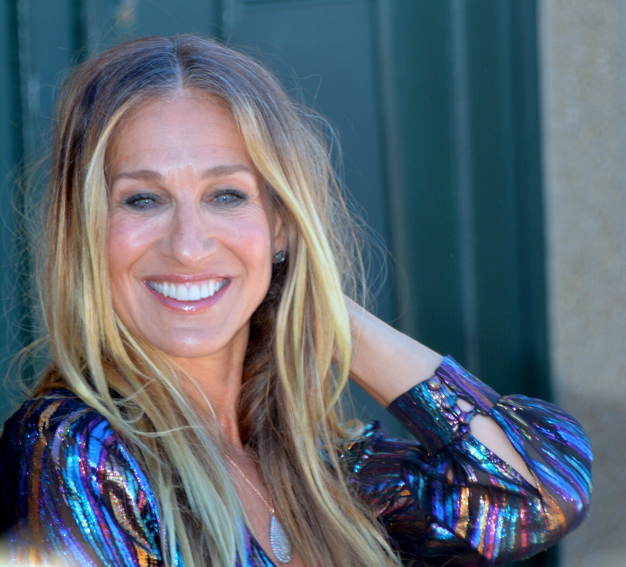 Sarah Jessica Parker au festival de Deauville